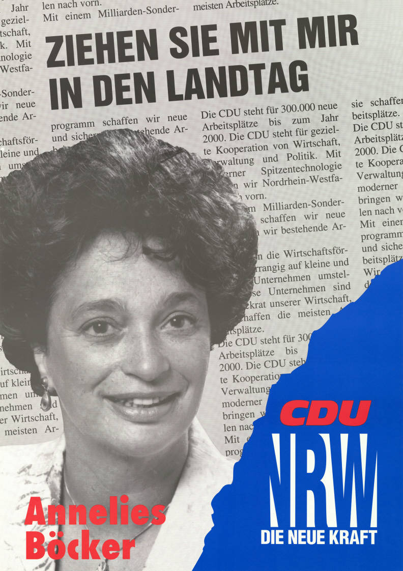 Ziehen Sie mit mir in den Landtag Annelies Böcker CDU NRW Die neue KraftAbbildung:Porträtfoto - ZeitungsartikelPlakatart:Kandidaten-/Personenplakat mit PorträtObjekt-Signatur:10-009 : 1332Bestand:Landtagswahlplakate Nordrhein-Westfalen (10-009)GliederungBestand10-18:Landtagswahlplakate Nordrhein-Westfalen (10-009) » CDULizenz:KAS/ACDP 10-009 : 1332 CC-BY-SA 3.0 DE